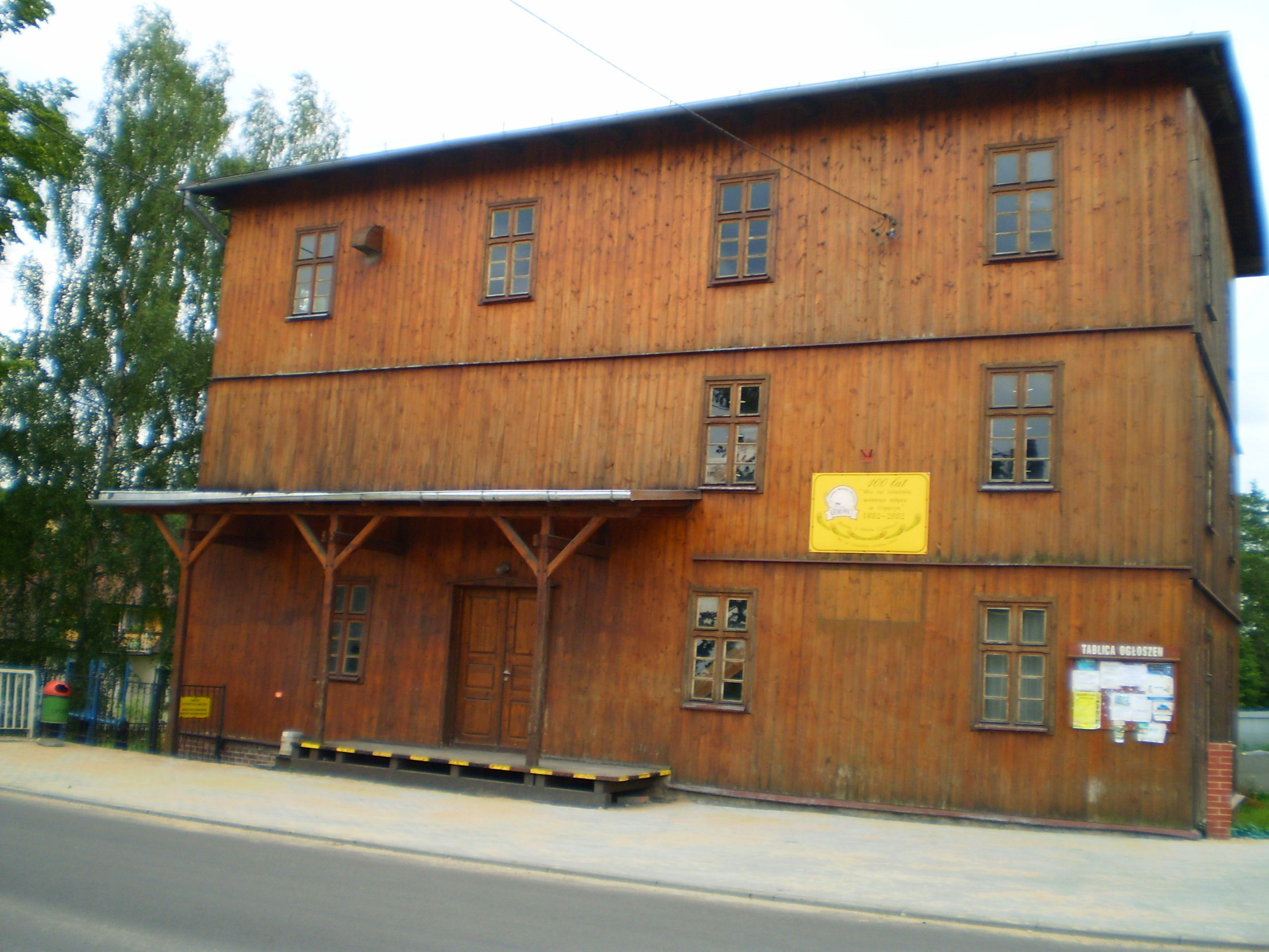 Młyn wodny z 1902 roku